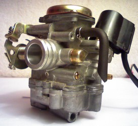 Karburator af CVK typen fra en Kymco Super 8 scooter med 4 takt motor